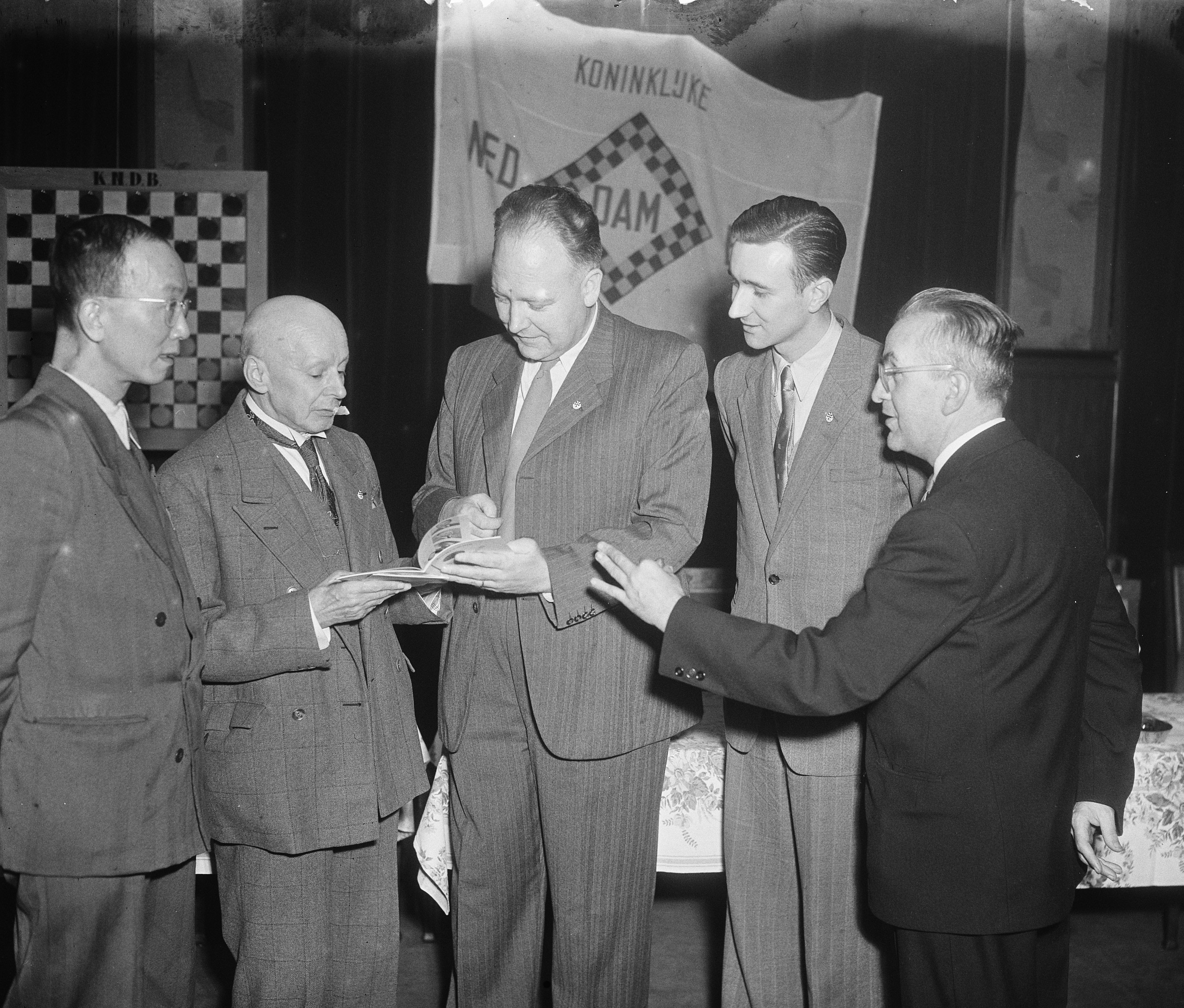 Ontvangst deelname Wereldkampioenschappen Dammen Amsterdam